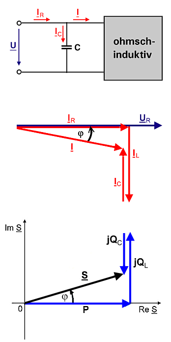 Blindleistungskompensation; Zeigerdarstellung in der Gaußsche Zahlenebene